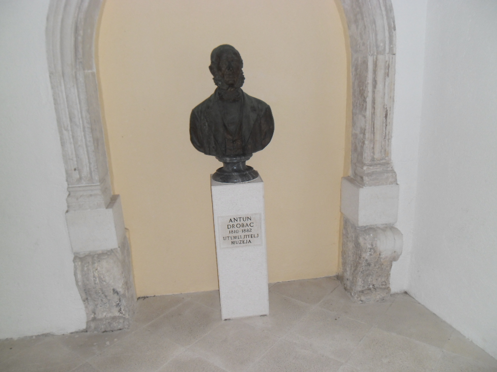 spomenik na ulazu u dubrovački prirodoslovni muzej